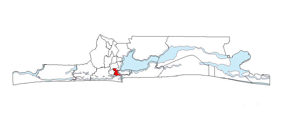 Ubicación de Apapa en el Estado de Lagos